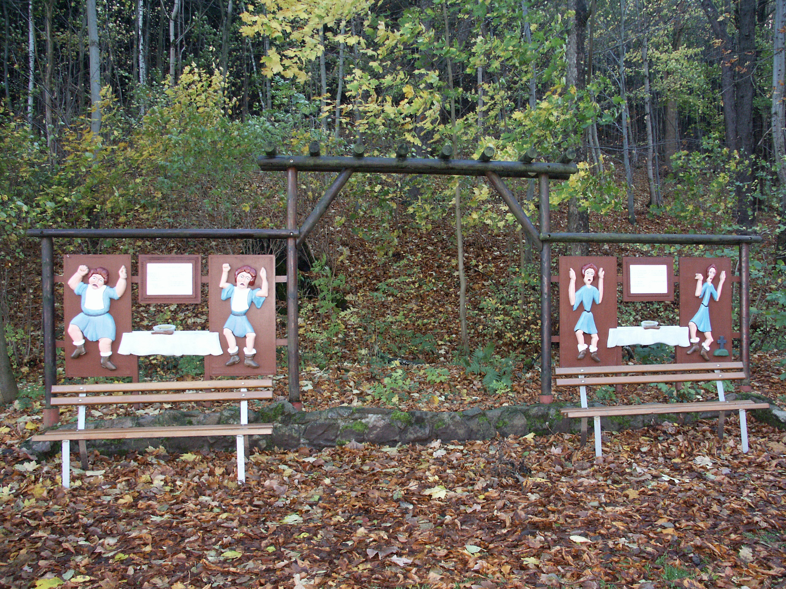 Struwwelpeter-Park Tabarz, geschnitzte Märchenfiguren "Die Geschichte vom Suppen-Kaspar"